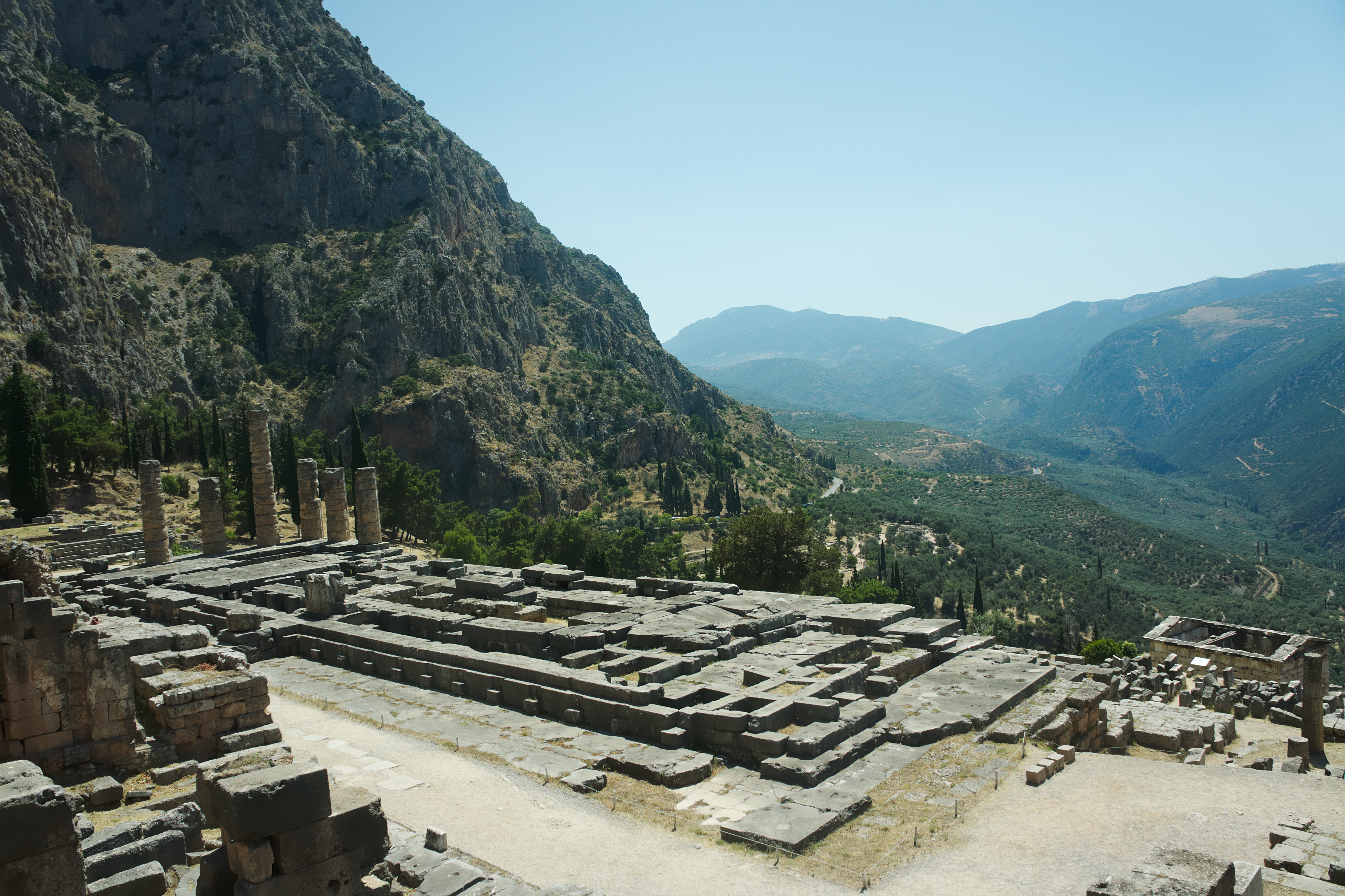 Temples d'Apollon sur le site archéologique de Delphes en Grèce.